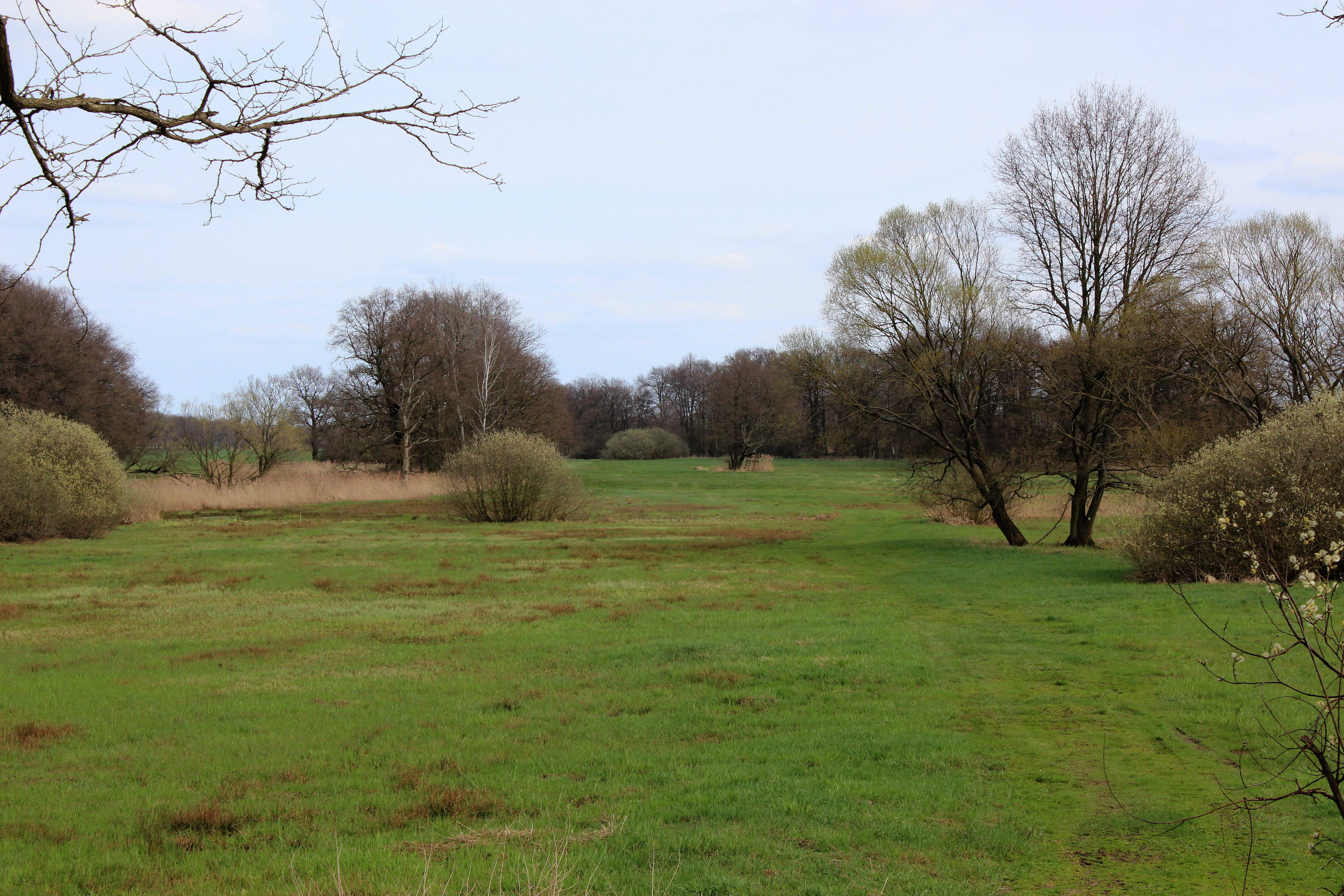 Das Naturschutzgebiet Alte Röder bei Prieschka.